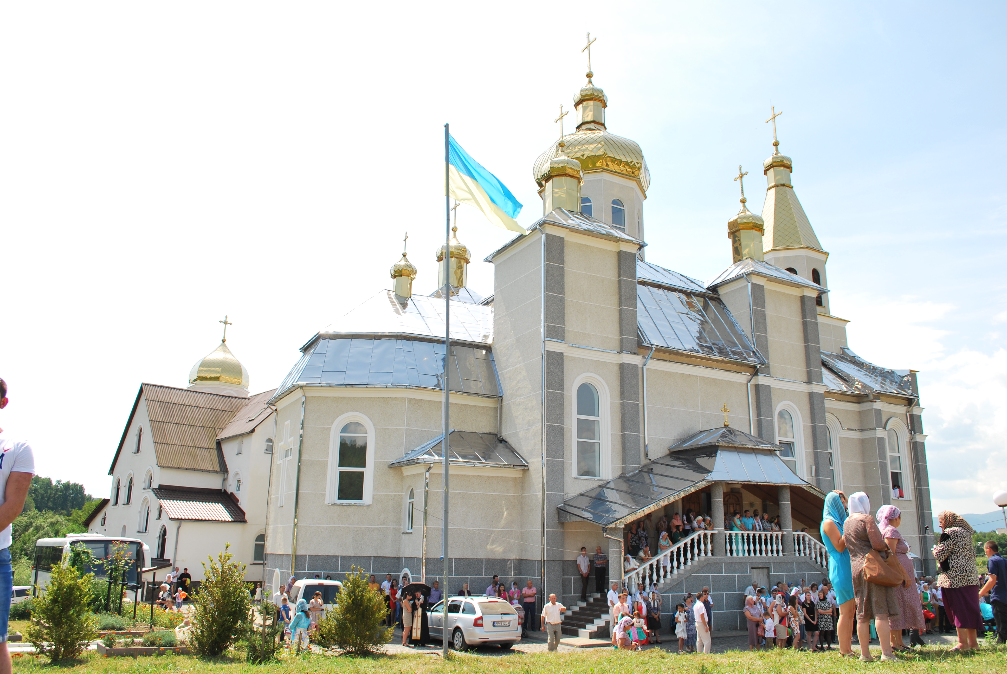 Боронявський монастир у 2015 році